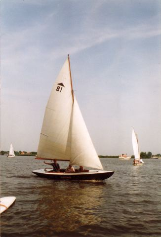 Pampus 81